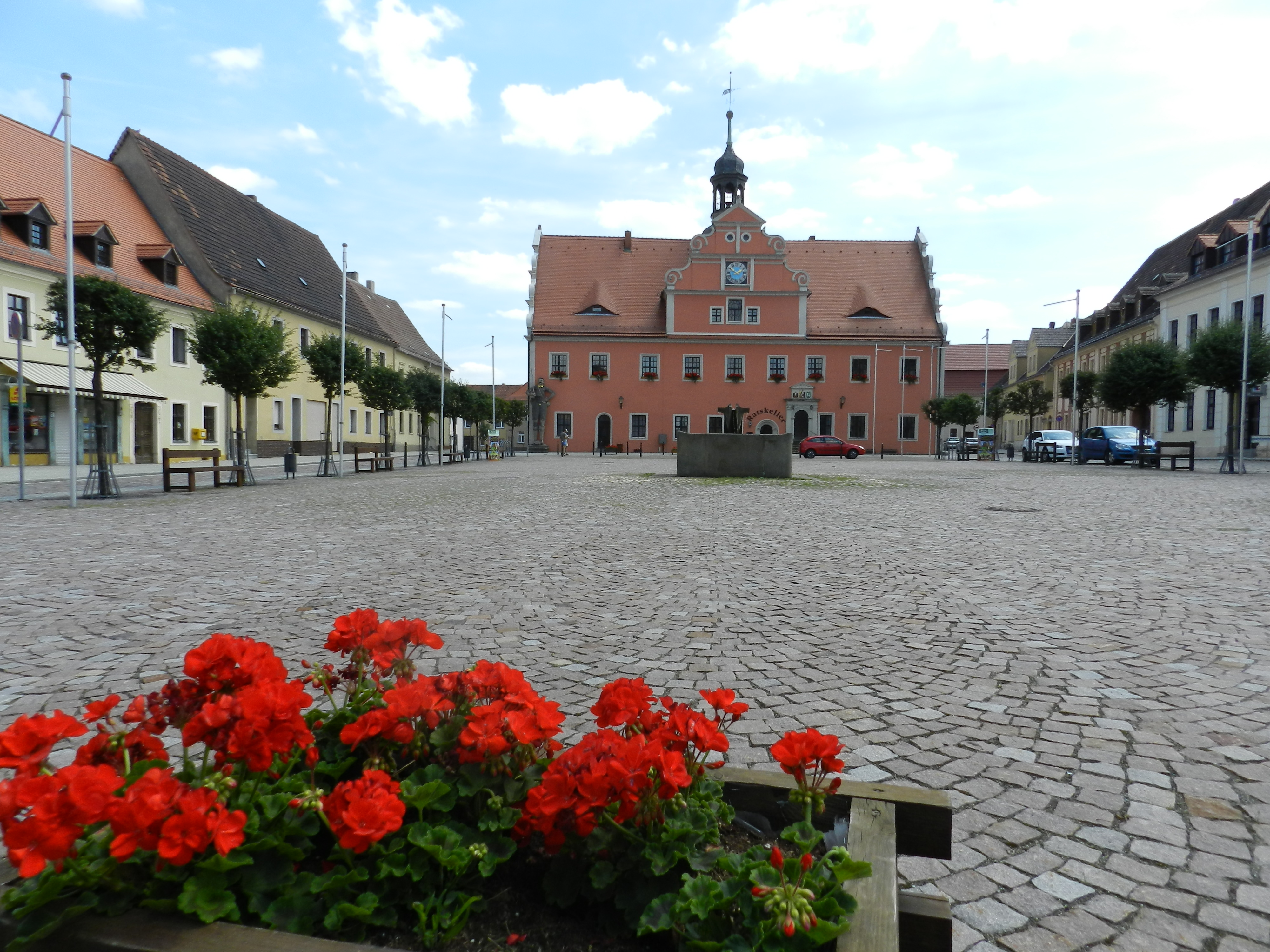 Belgern, Marktplatz mit Rathaus (23. Juli 2011)